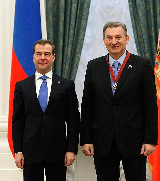 Вручение государственных наград. Орденом «За заслуги перед Отечеством» III степени награждён президент Федерации хоккея России Владислав Третьяк.